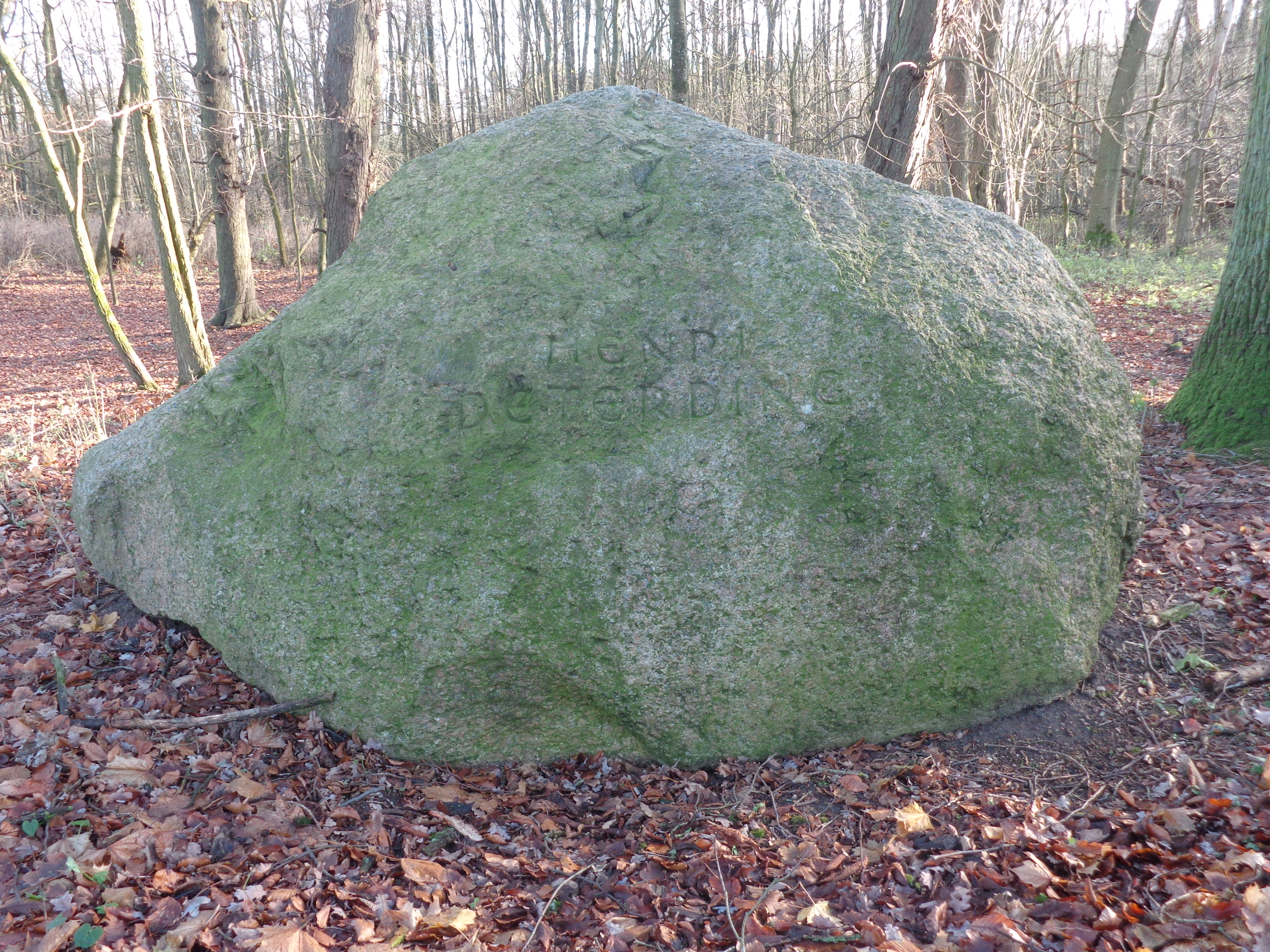 Findling an der ehemaligen Grabstelle von Henri Deterding in Dobbin.